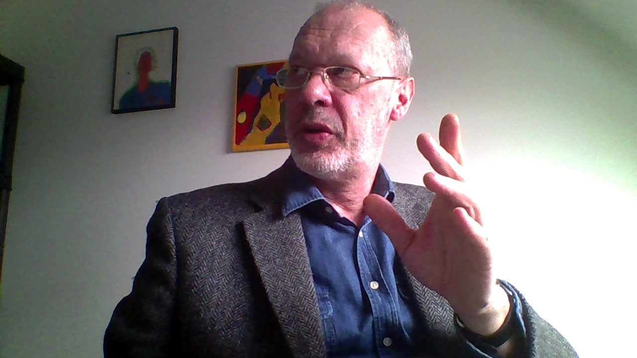 Jan Blommaert